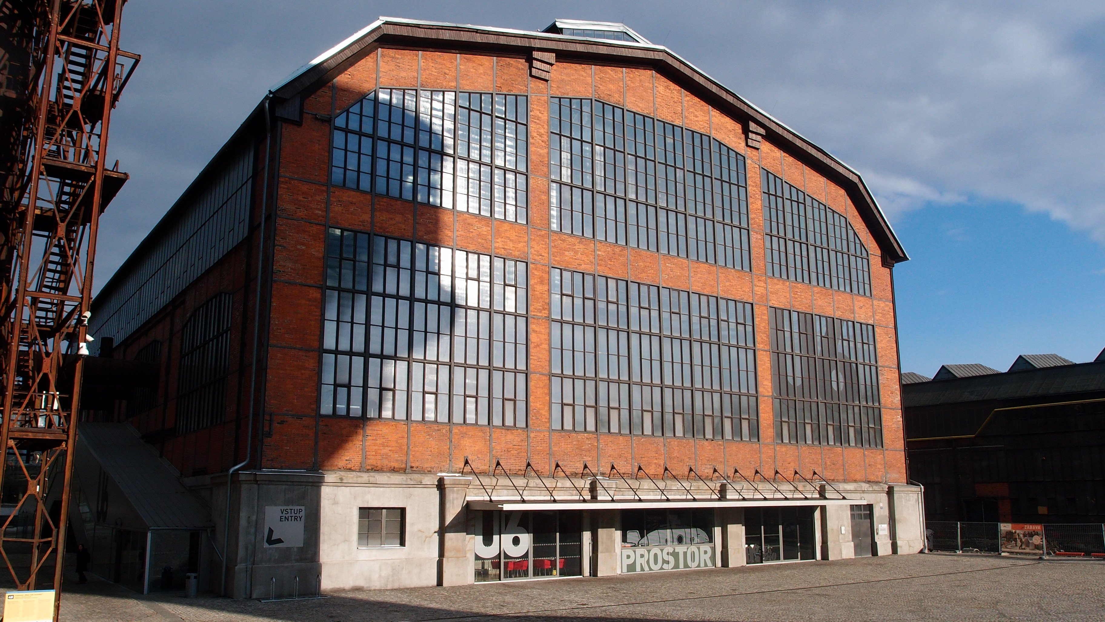 Budova VI. energetické ústředny, která se nachází v Dolní oblasti Vitkovice v Ostravě. Zrekonstruována na interaktivní expozici Malý svět techniky U6.